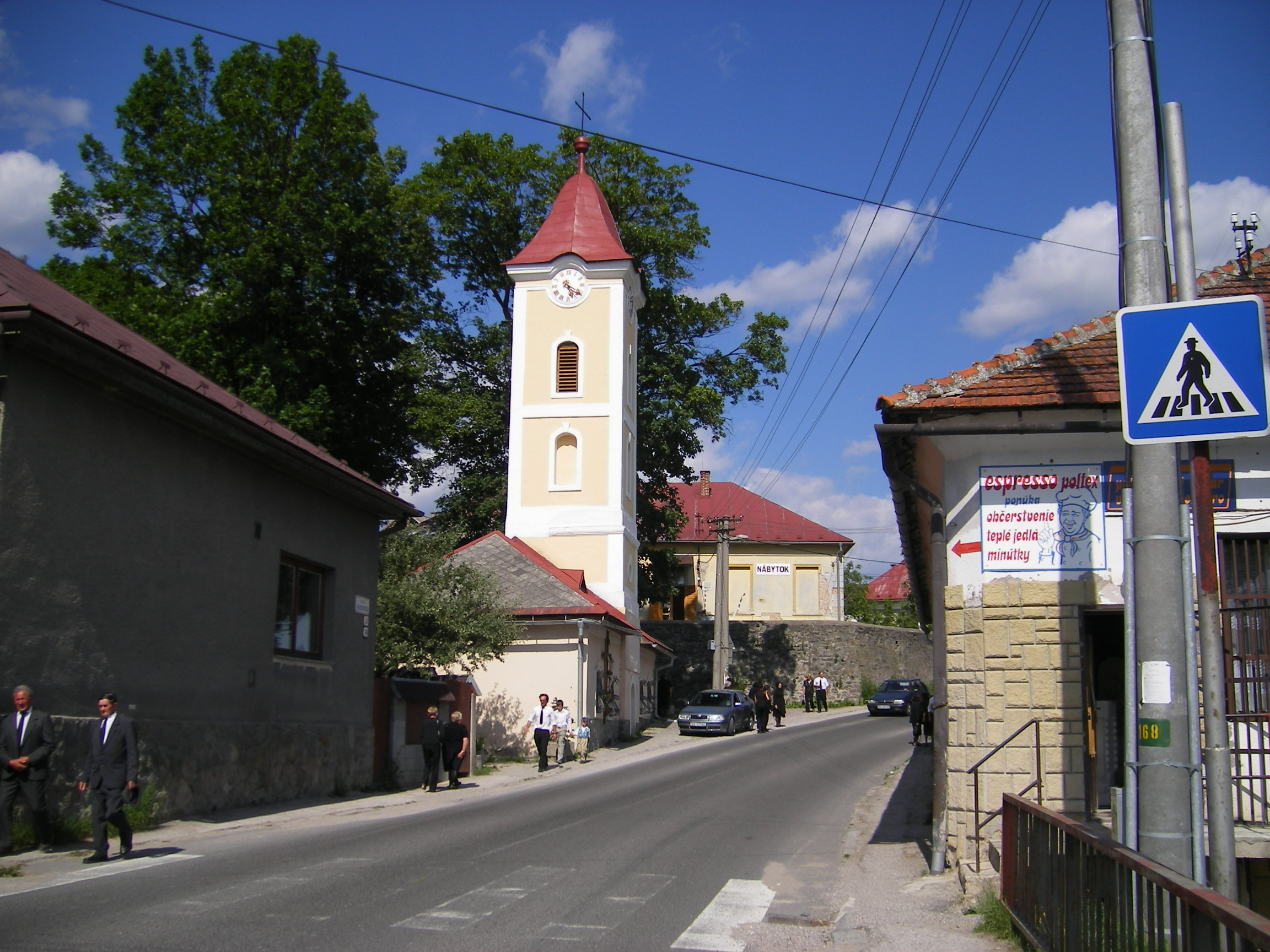 Polomka (okres Brezno)